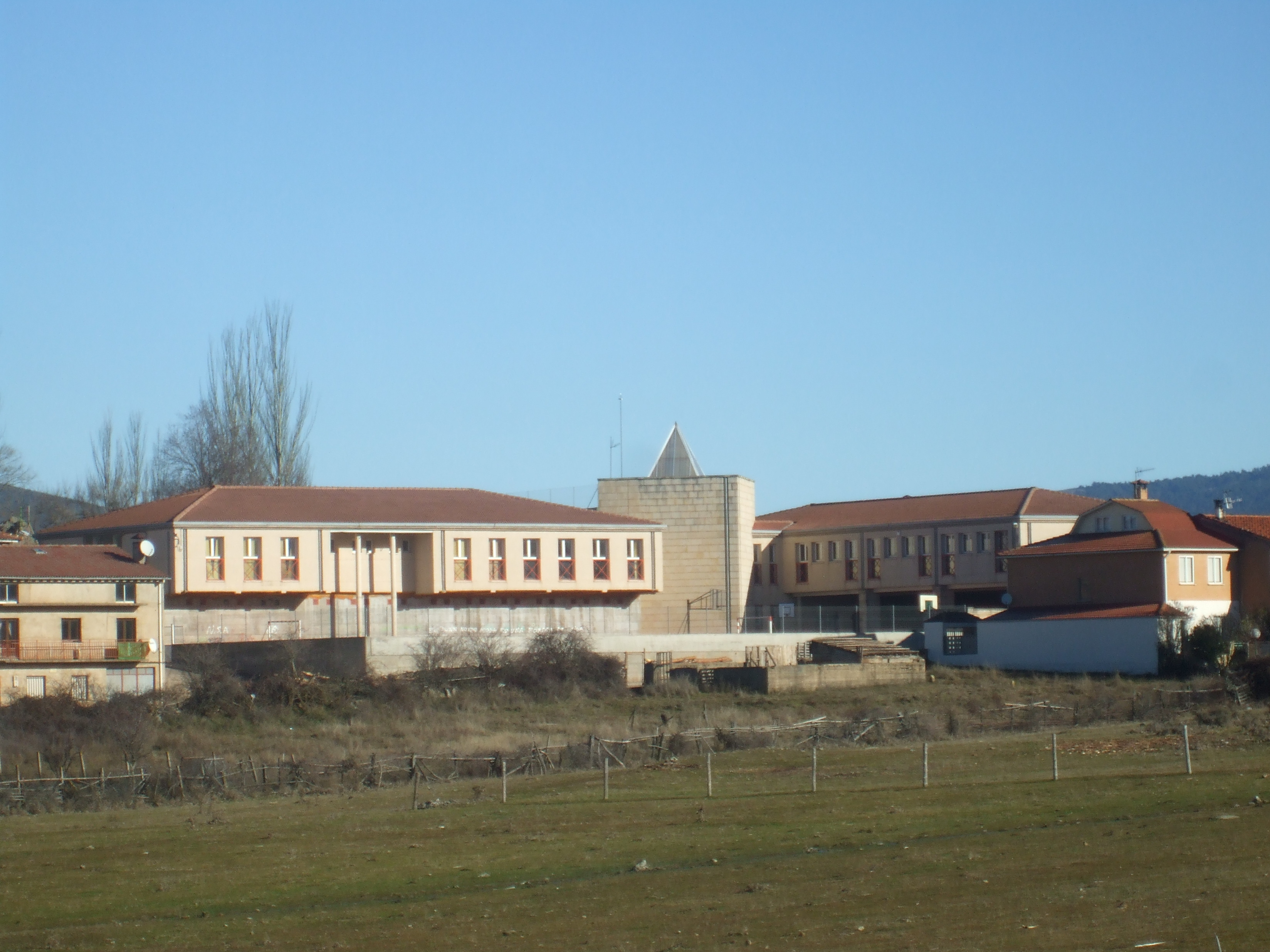 Escuelas de Primaria en Vilviestre del Pinar: centro escolar.